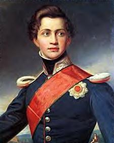 King Otto of Greece